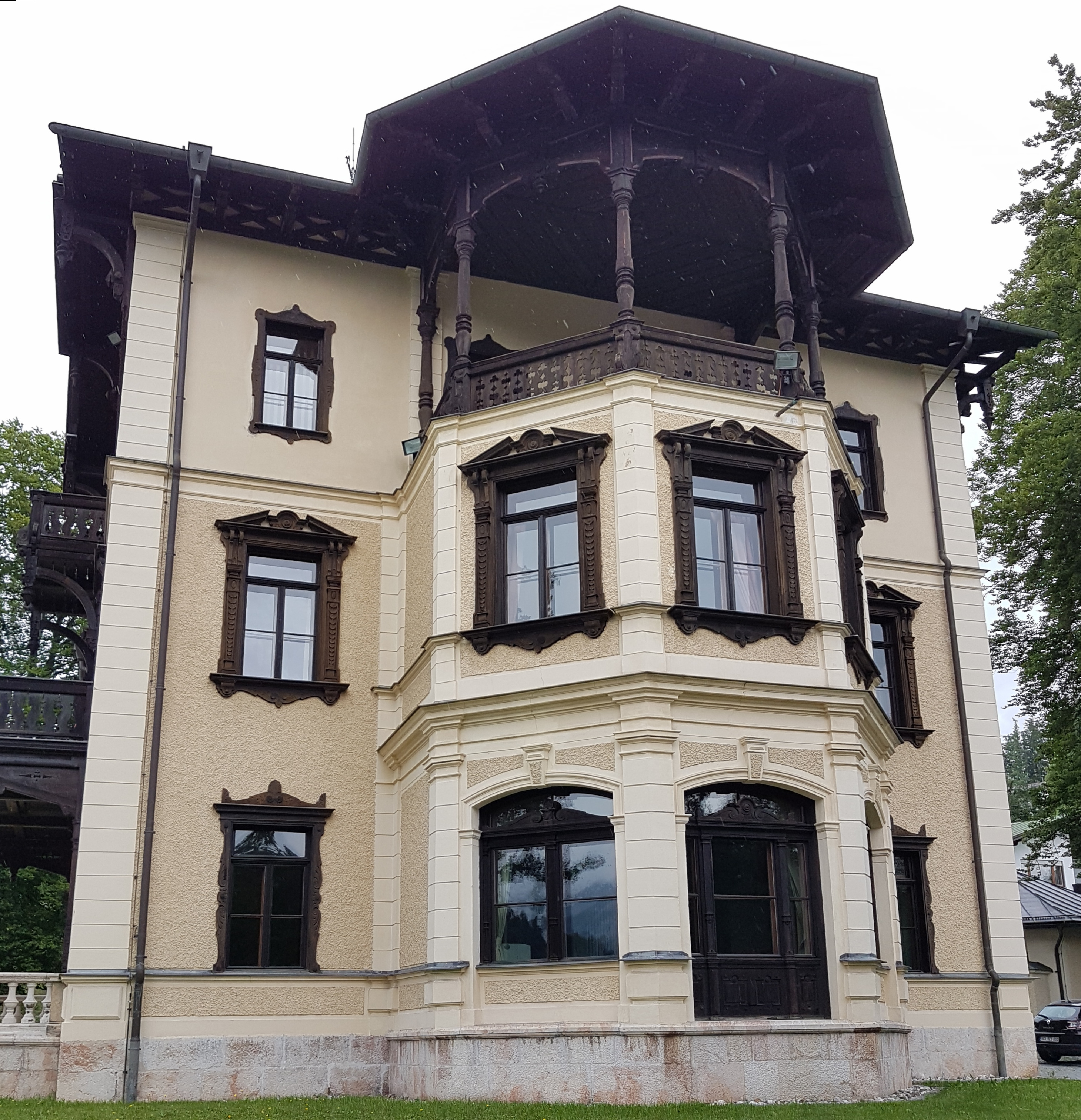 Villa Bayer (Berchtesgaden)